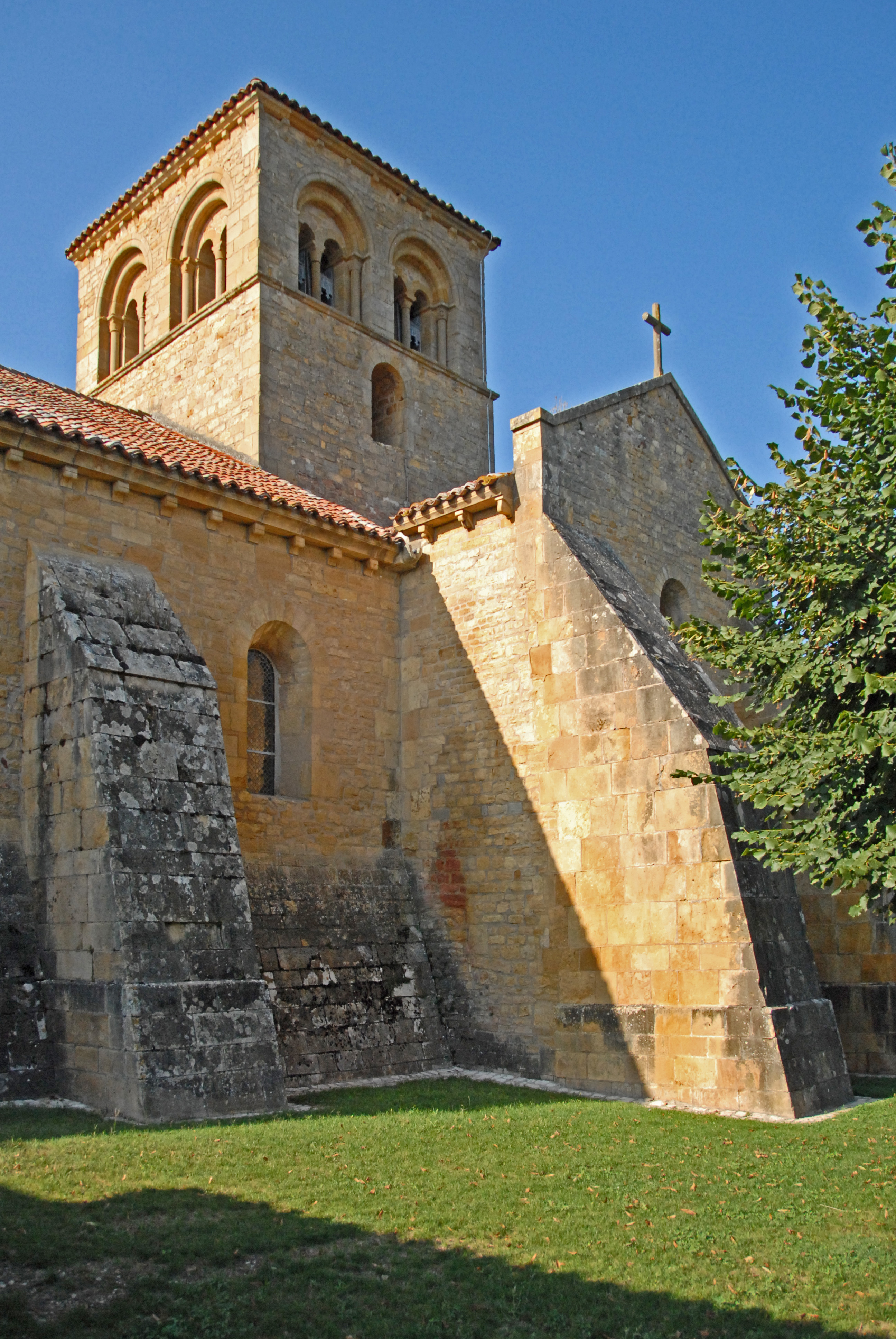 St-André d'Iguerande, Querhaus und Turm von Süden